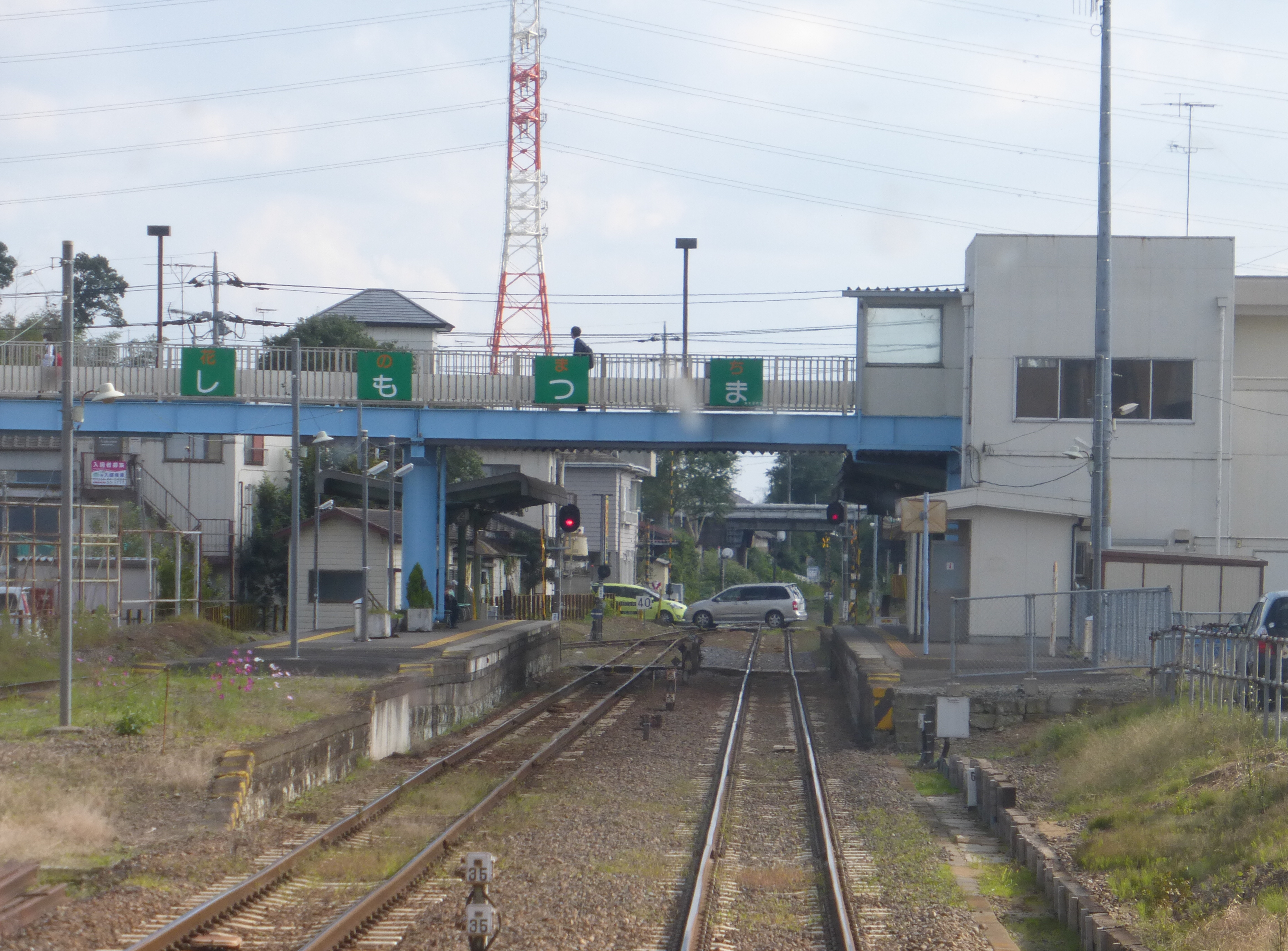 Shimotsuma Station (下妻駅)